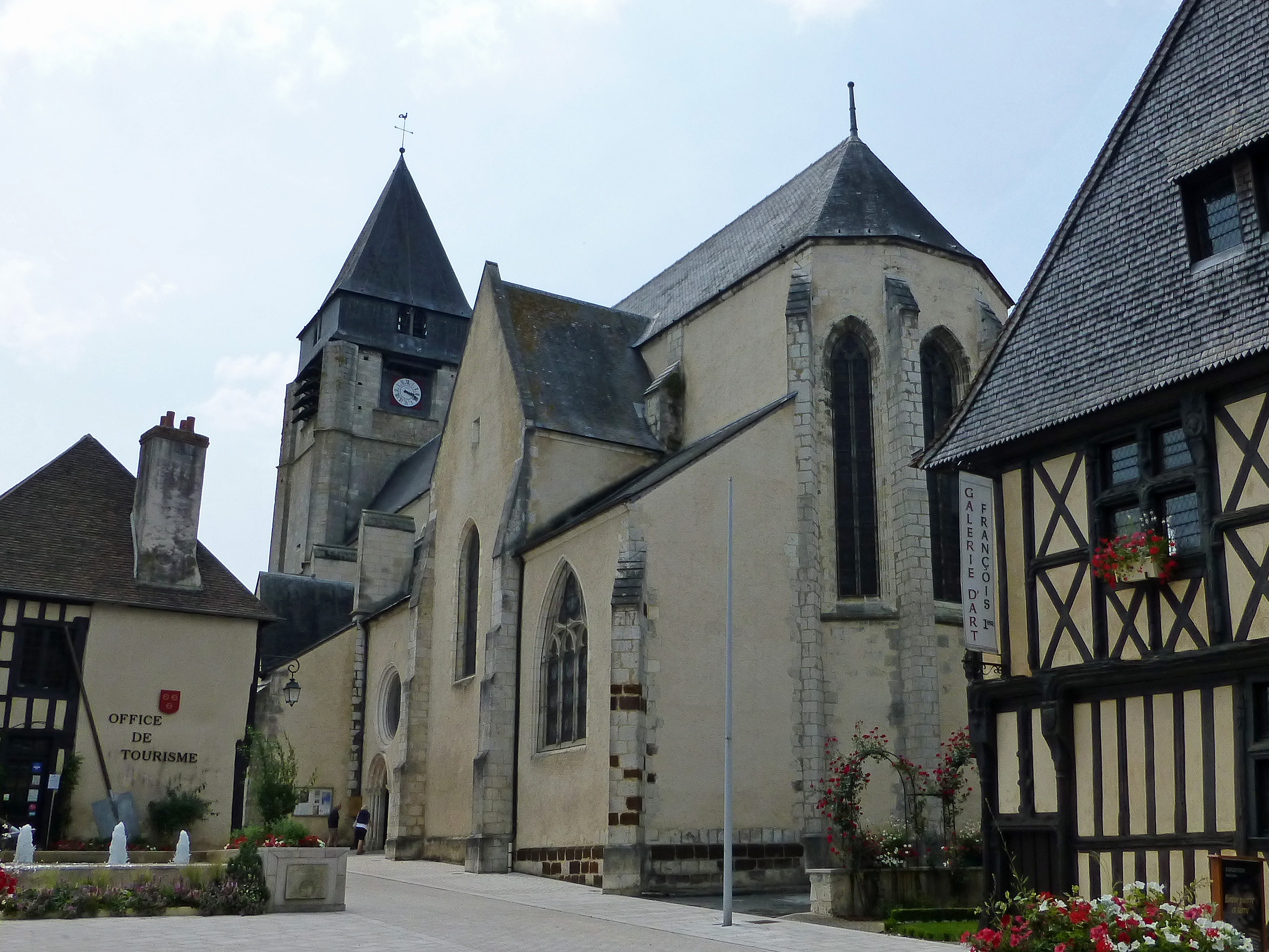 Aubigny-sur-Nère (Cher) : église Saint-Martin